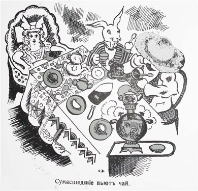 Залшупин Сергей Александрович. Иллюстрация к «Алисе в стране чудес» Л. Кэрролла